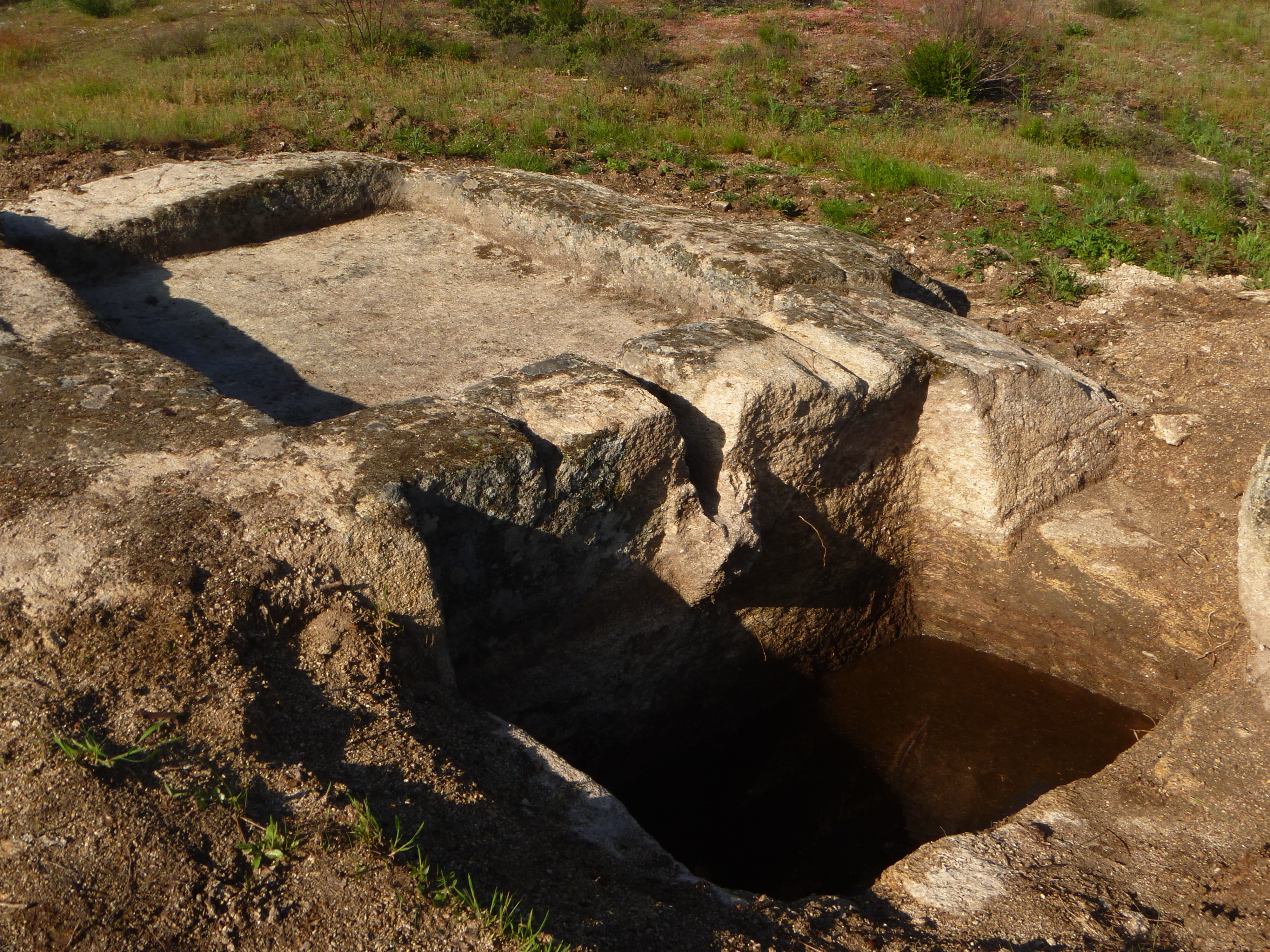 Lagar rupestre de Oímbra